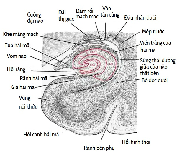 Vị trí và đinh khu hải mã Bởi J. A. Kiernan modified from Edinger, 1899(L. Edinger, The Anatomy of the Central Nervous System of Man and of Vertebrates in General, F.A. Davis, Philadelphia, Pa, USA, 5th edition, 1899, Edited by W. S. Hall assisted by P. L. Holland and E. P. Carlton.)Epilepsy Research and Treatment Vol 2012, Article ID 176157, 12 pages – , CC BY-SA 4.0 , Liên kết